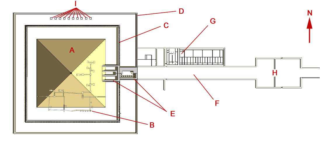 Rekonstruktion des Pyramidenkomplexes des Amenemhet III. in Dahschur